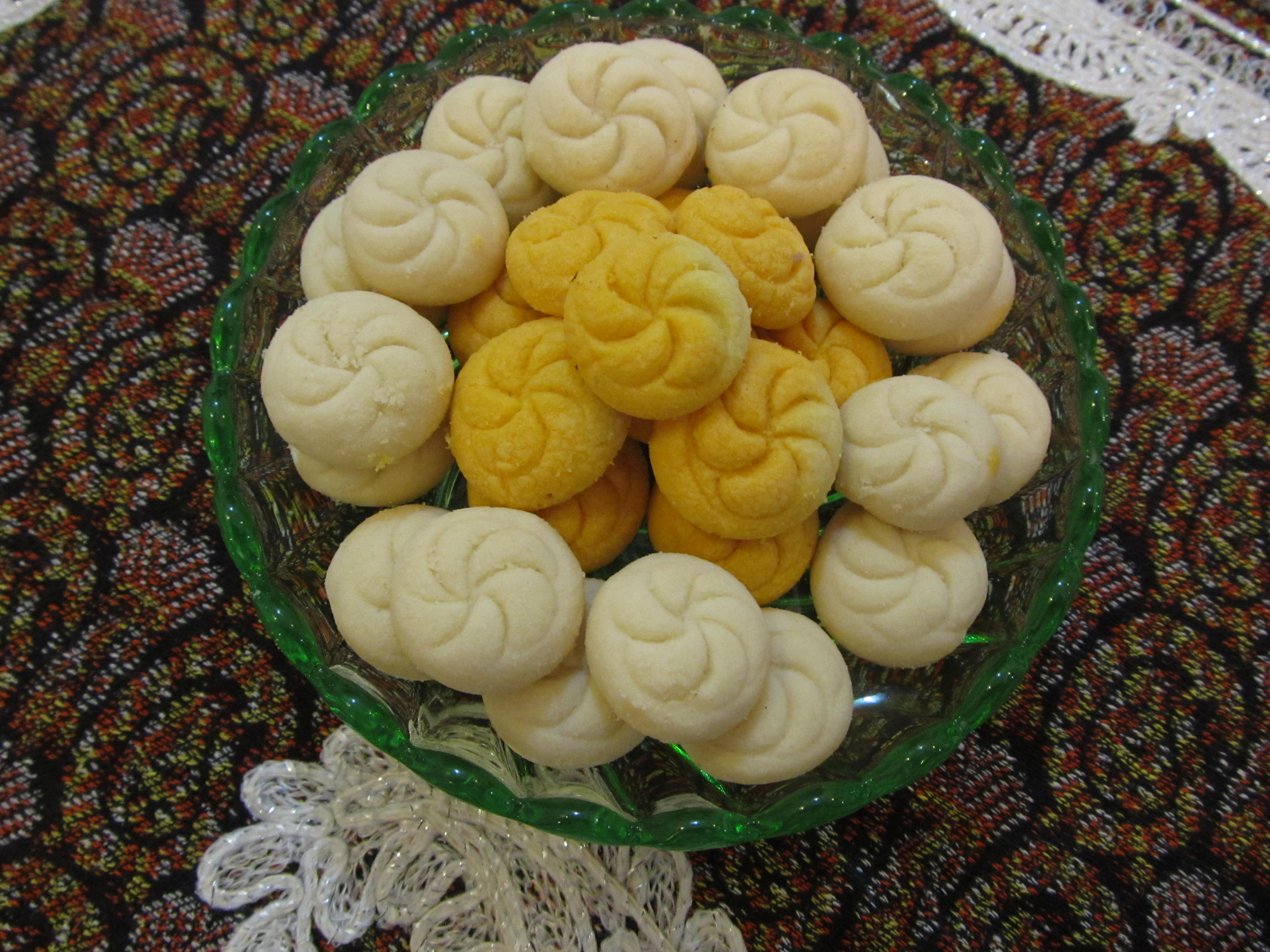 نان برنجی از انواع شیرینی های سنتی قزوین